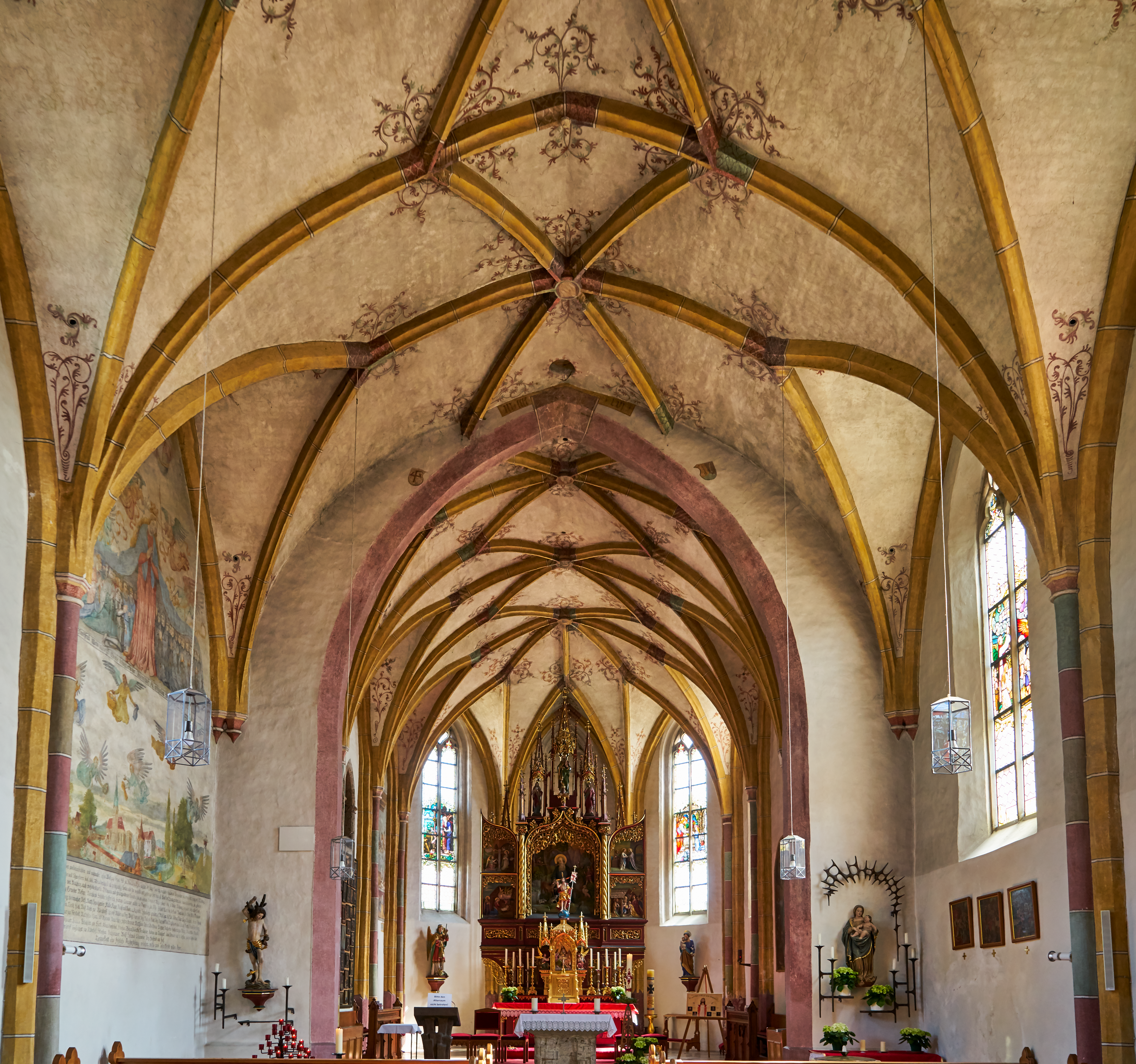 Katholische Pfarrkirche St. Aegidius Malching. Blick von Langhaus zum Chor.